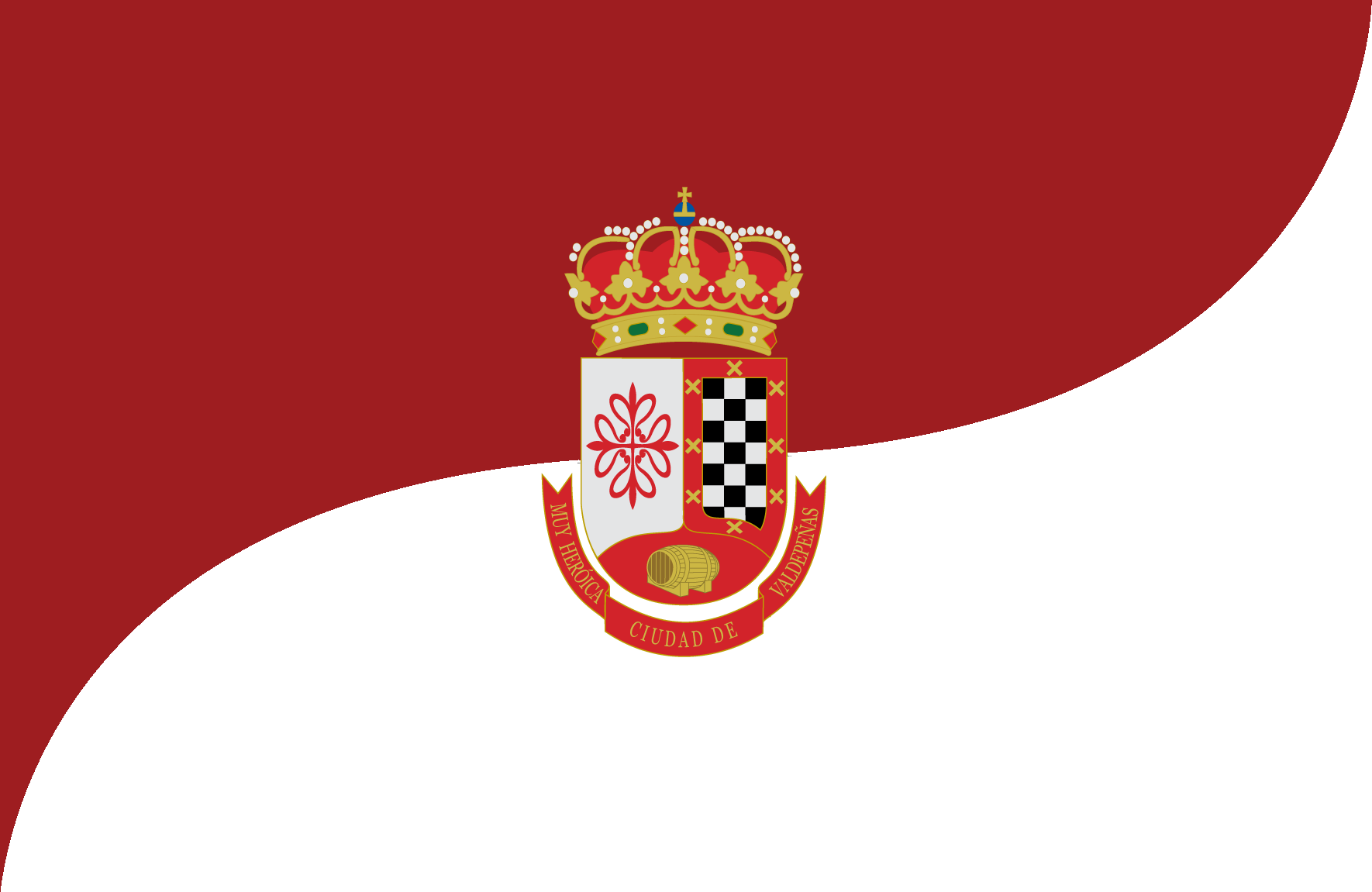 Roja y blanca en forma de espiral y con el escudo municipal en color plastico